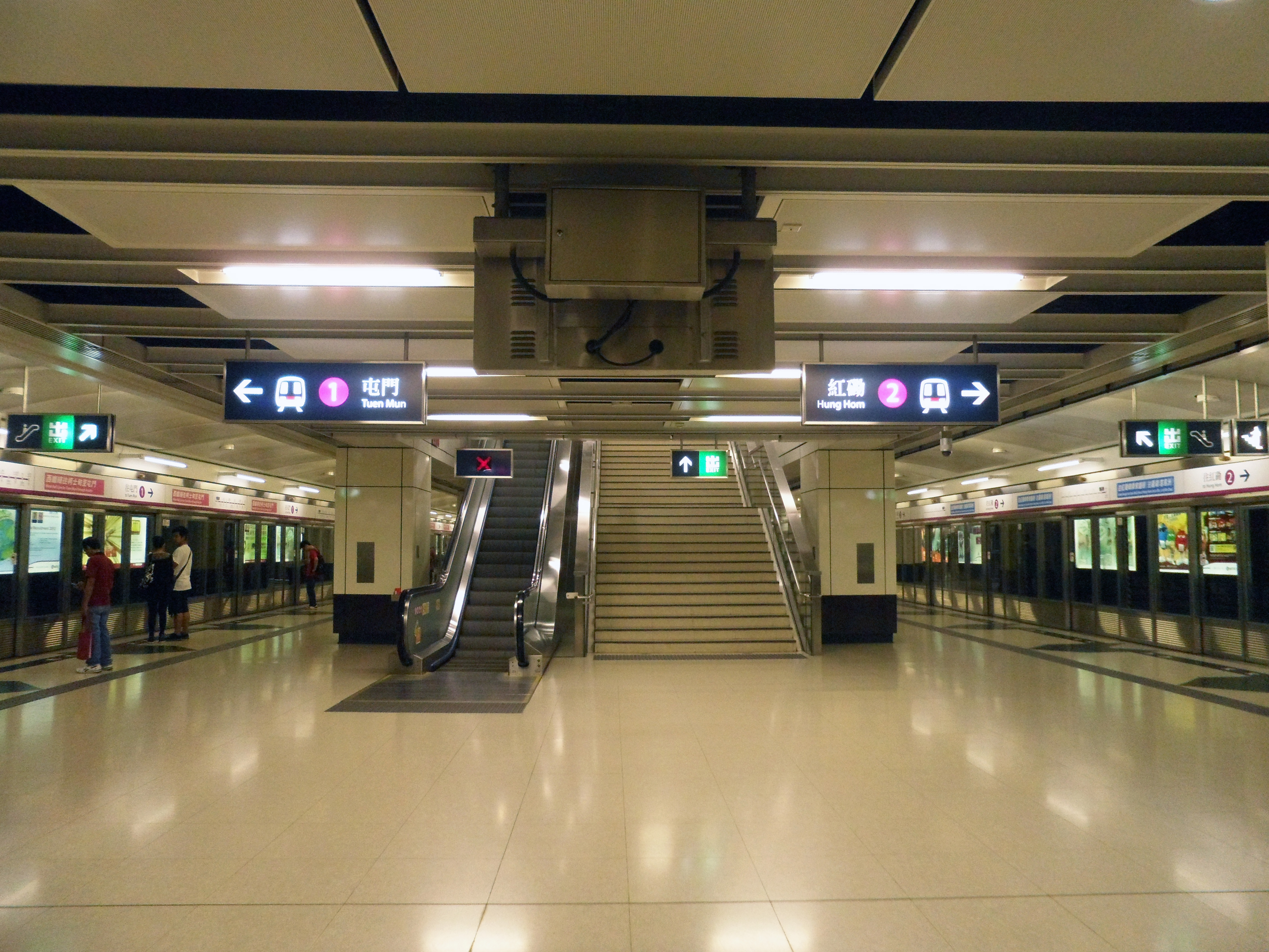 港鐵尖東站月台往大堂通道